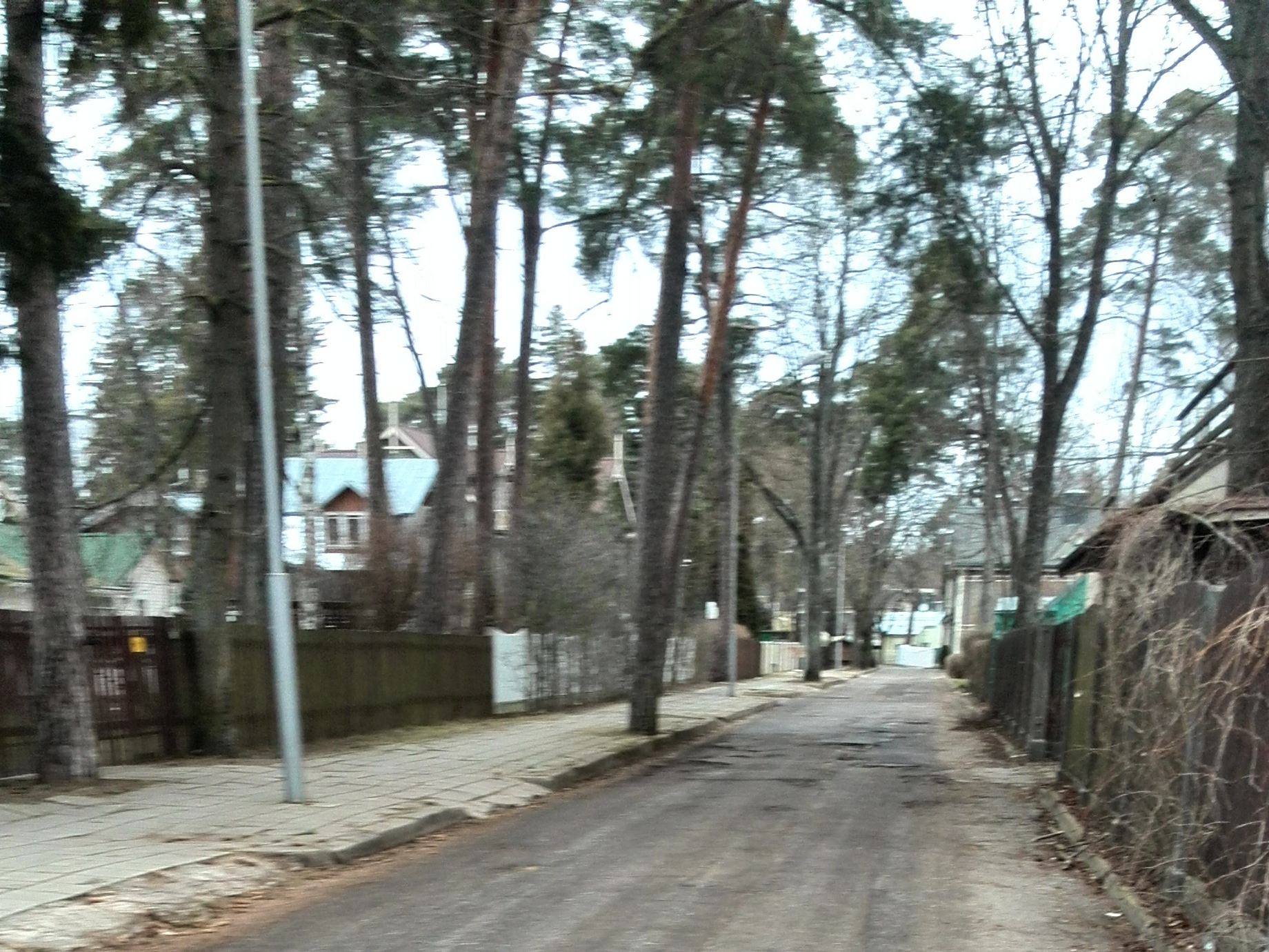 VIļuma iela, Jūrmala